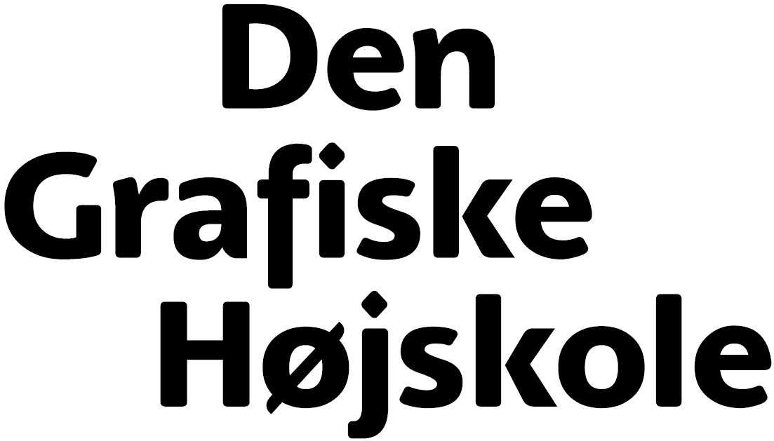 Logo 4